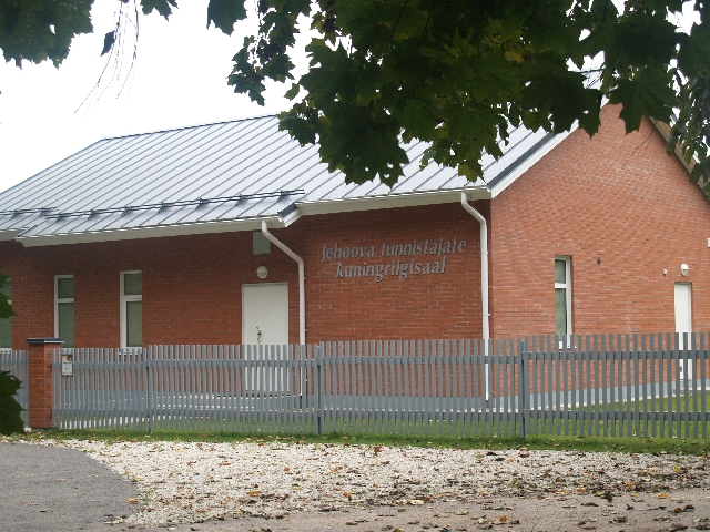 Põltsamaa